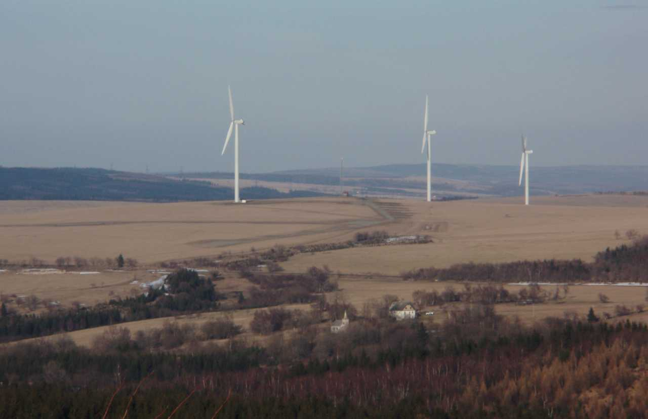 Pohled z vrcholu Mědníku severovýchodním směrem na náhorní planinu Krušných hor